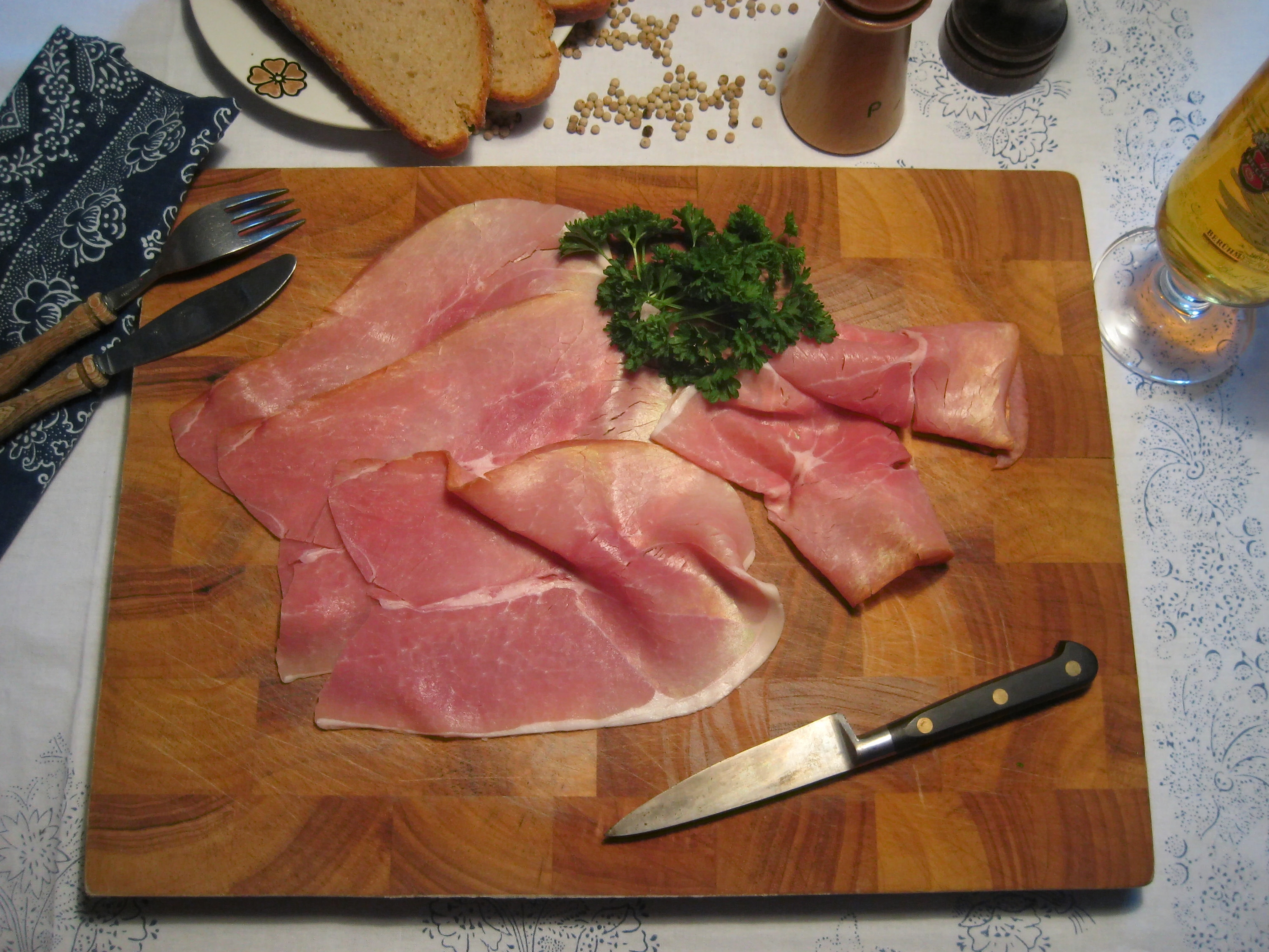 Holsteiner Katenschinken-Platte: Brotzeit mit Holsteiner Katenschinken, „Bauernbrot“ (würziges Natursauerteig-Brot mit kräftiger Kruste), Butter, Pfeffer, etwas Petersilie und einem Bier